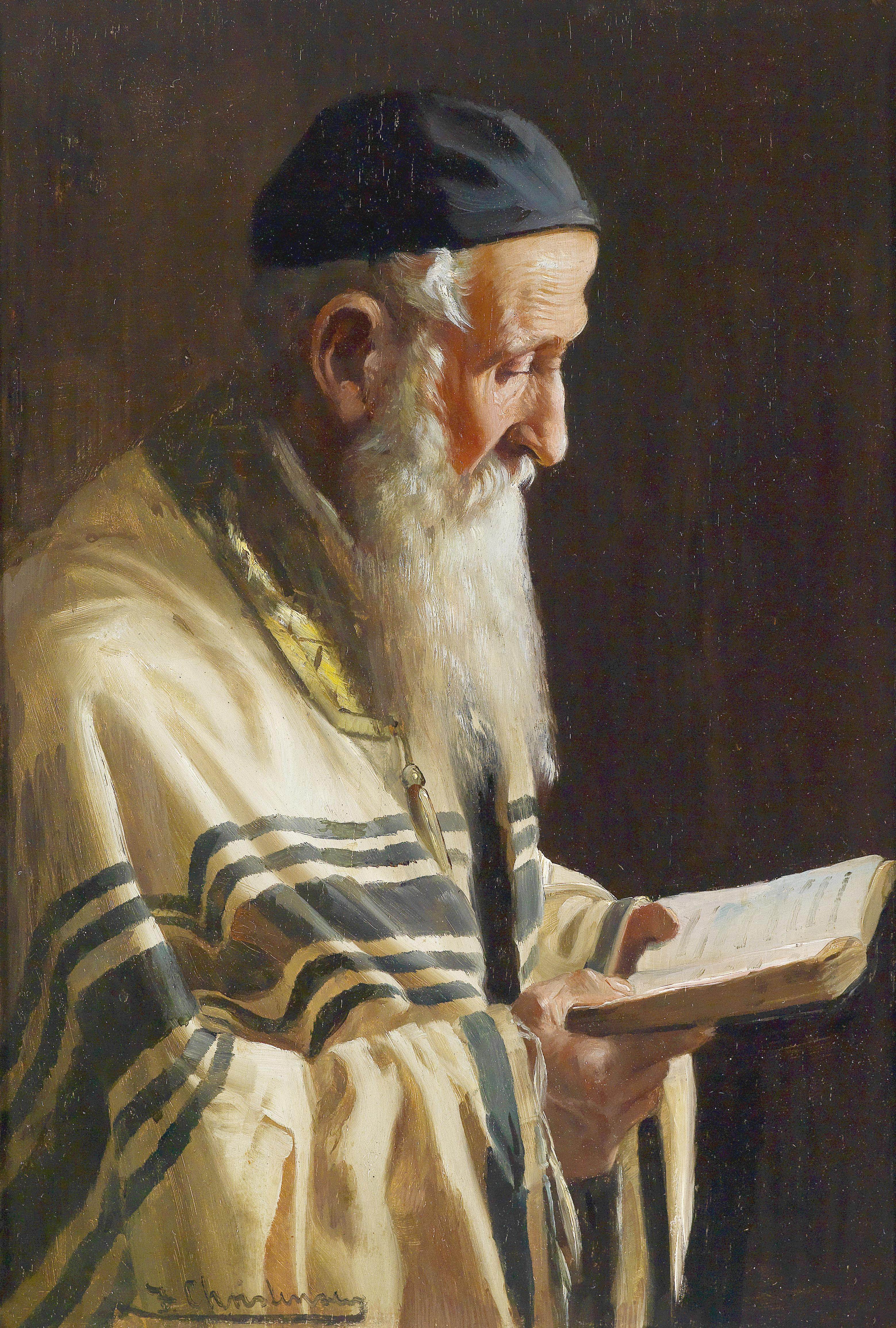 Rabbi, undeutlich signiert J. Christ...., Öl auf Holz, 35 x 24 cm